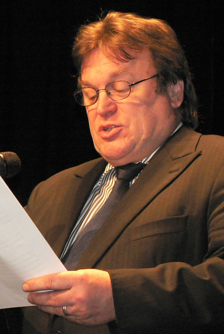 Gulyás Dénes operaénekes a Magyar Kultúra Napján 2010-ben